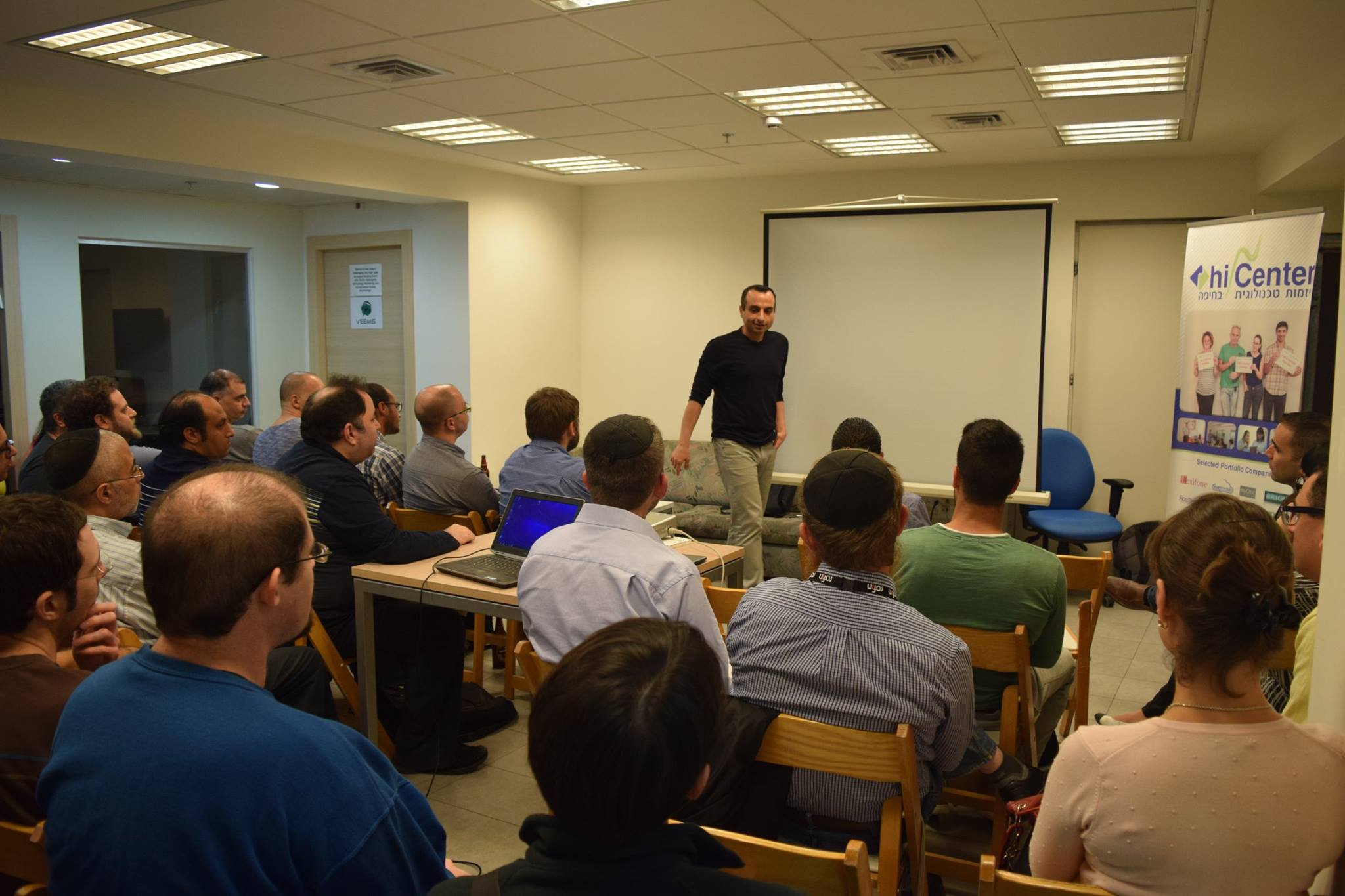 מפגש של תכנית 'יזמים בג'ינס'